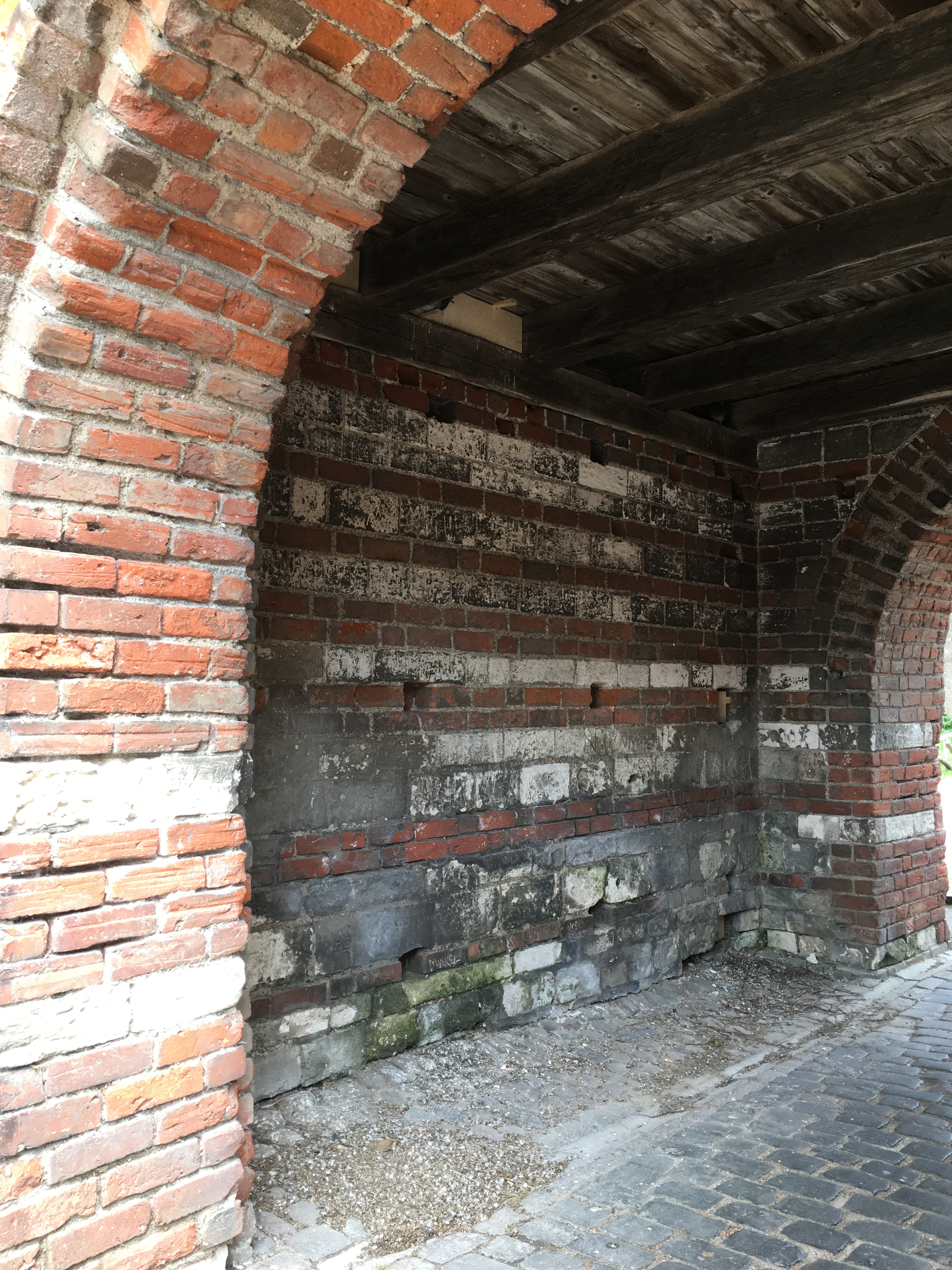 Mølleporten i 2020 under renovering.